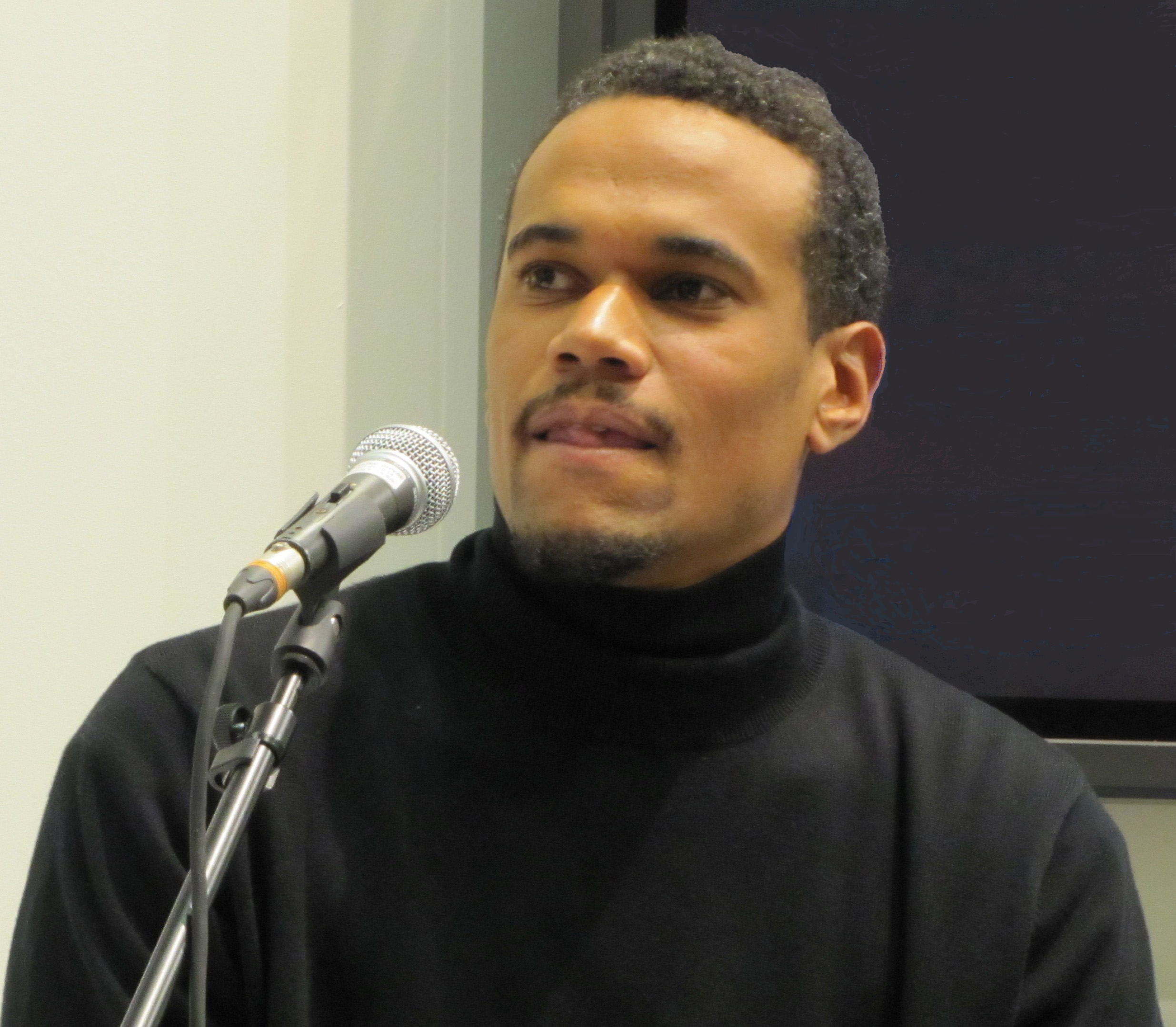 Svenske poeten Johannes Anyuru på Bokmässan 2010 vid en intervju i Sveriges Tidskrifters monter arrangerad av tidningen Vi och bokmagasinet Vi läser.